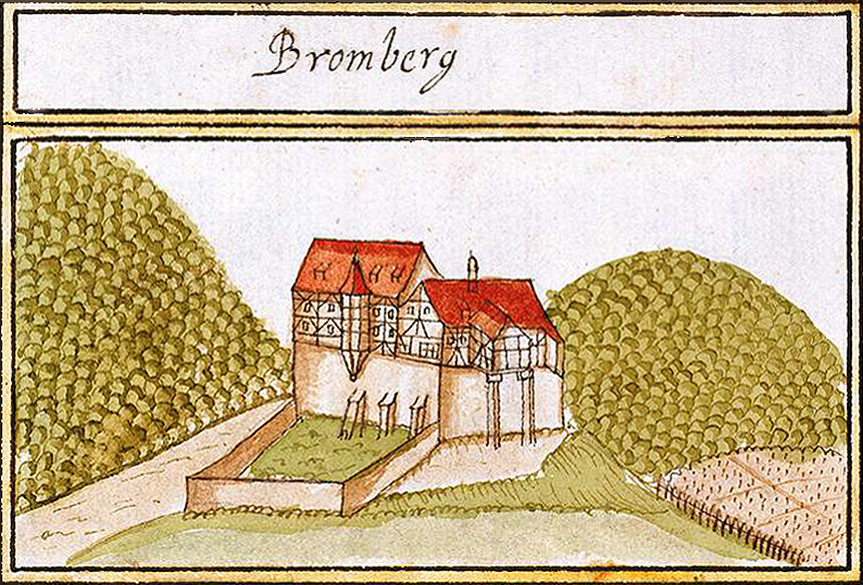 Burg Bromberg 1683 als Ortsansicht im Forstlagerbuch von Andreas Kieser; Blick von Norden